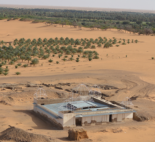 Widok na stanowisko Banganarti - fot. Bogdan Żurawski